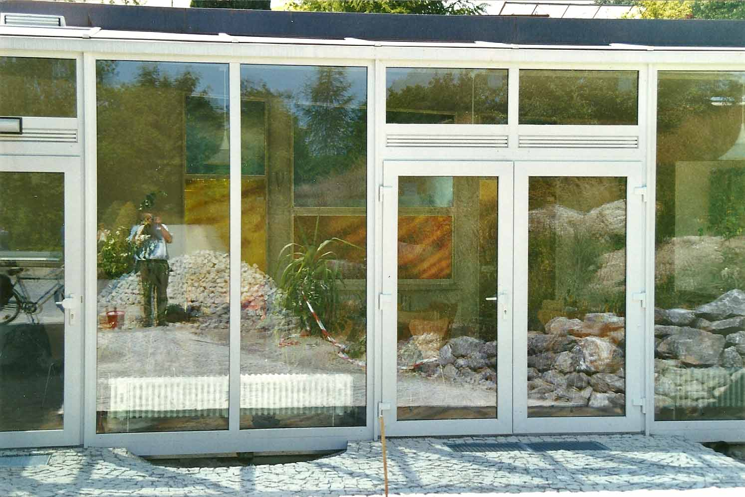 Fotografie (außen) einer Glasmalerei, entworfen und ausgeführt von Martin Gensbaur in den Werkstätten Gustav van Treeck, München, 2001/2002 für das Schulzentrum Kirchseeon